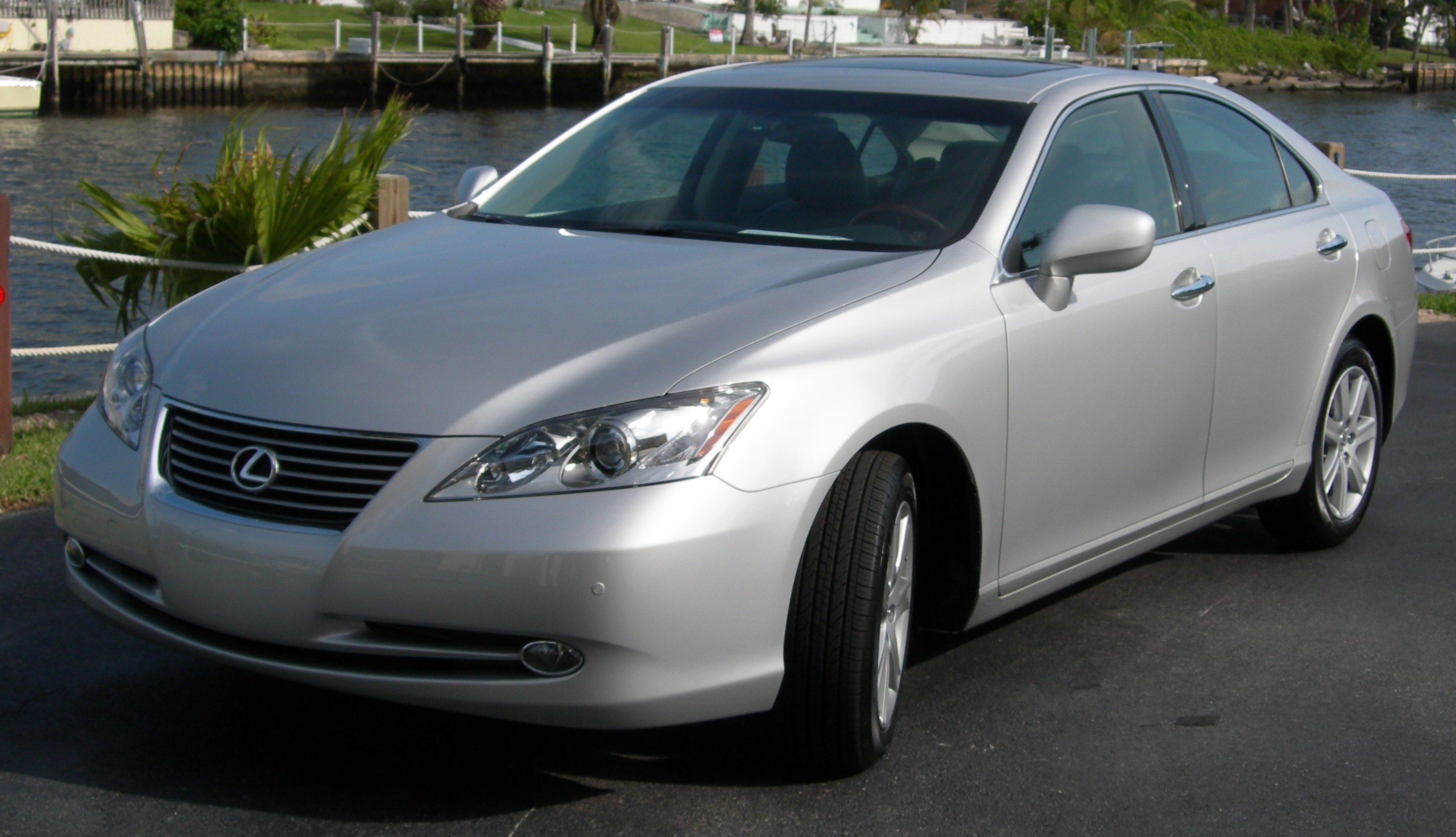 2007 Lexus ES 350